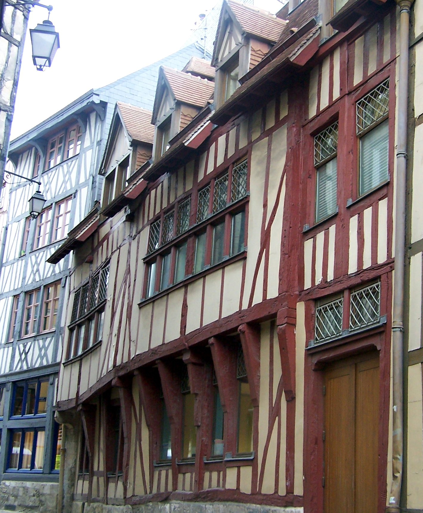 Encorbellement primitif à Rouen, rue du Petit Mouton (XIVe siècle)